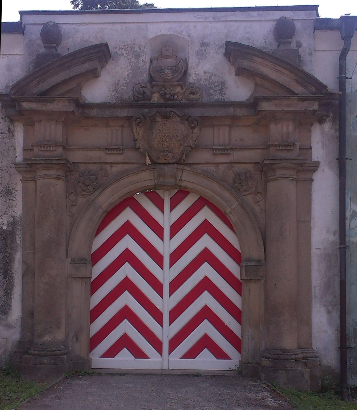 Květná zahrada, Gen. Svobody 1192/39, Kroměříž.